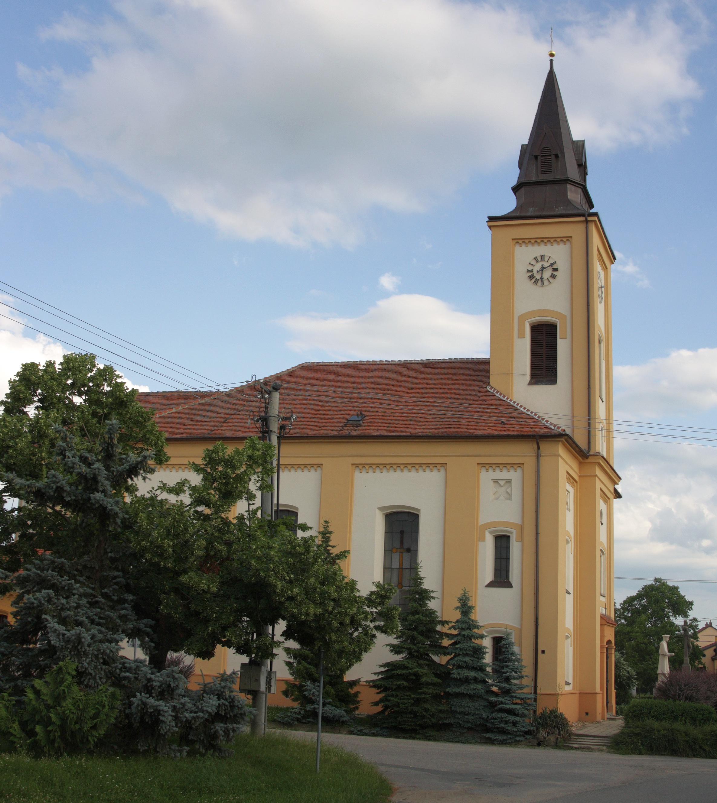 Opatovice - kostel sv Karla Boromejského - jižní pohled.